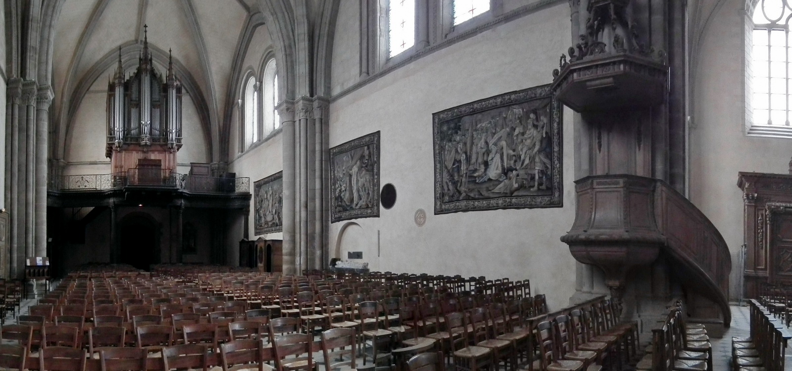 Laval (Mayenne, Pays de la Loire, France) cathédrale de la Sainte-Trinité, orgue d'Aristide Cavaillé-Coll de 1853, restauré par Jean Renaud en 1976.